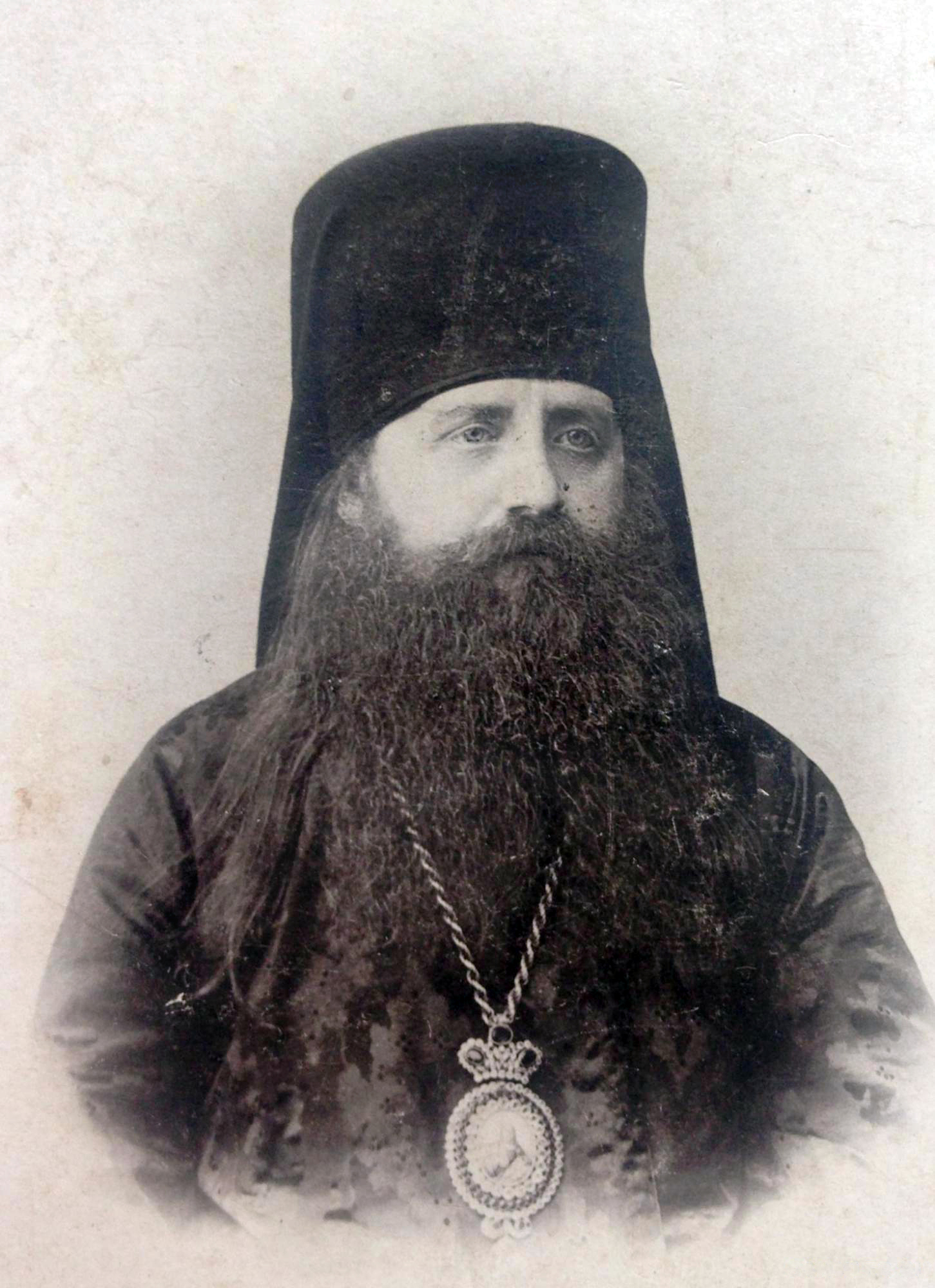 Архиепископ Волынский и Житомирский Антоний (Храповицкий)